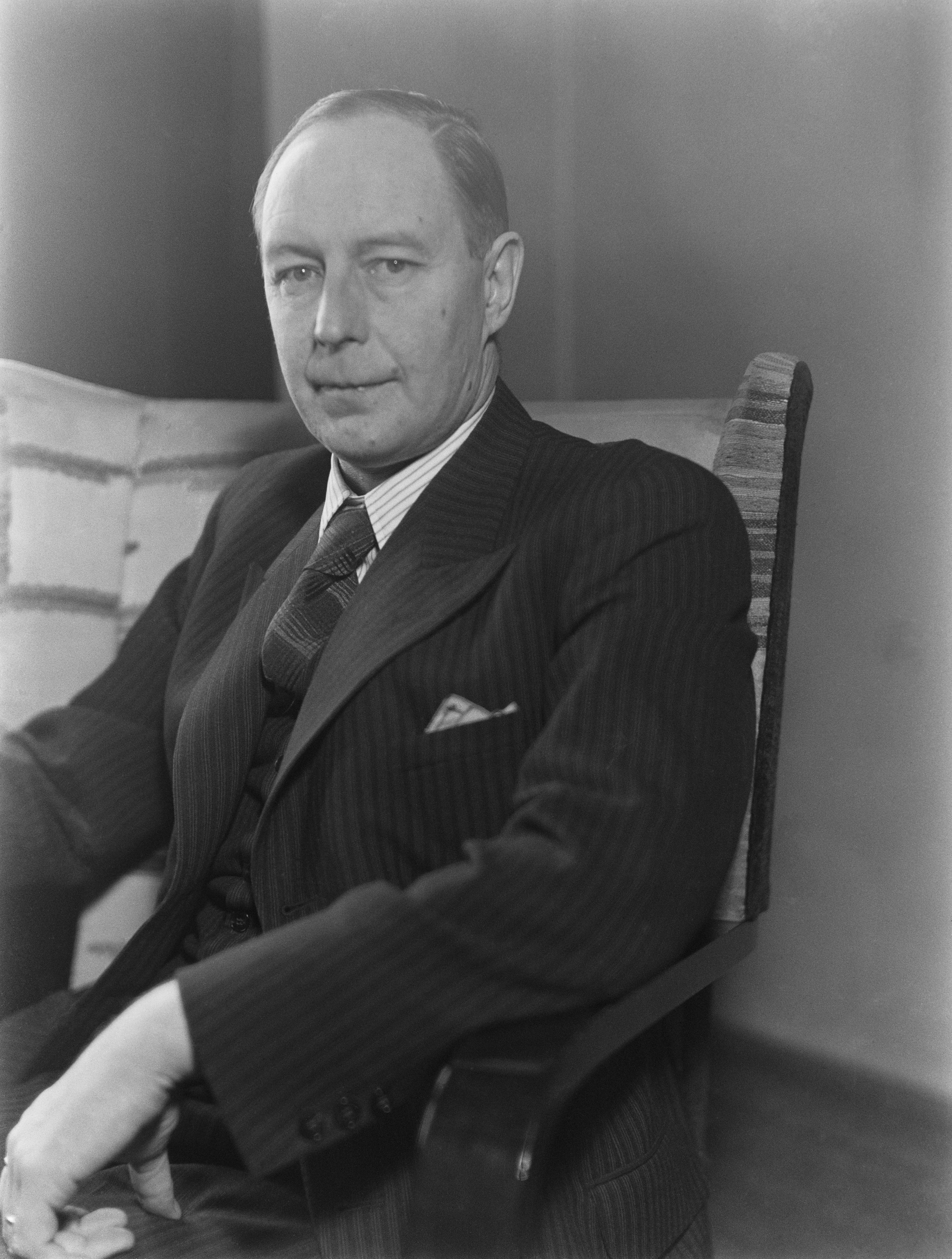 Jalmar Voldemar Vakio, Geschäftsführer des finnischen Yleisradios (Yle)